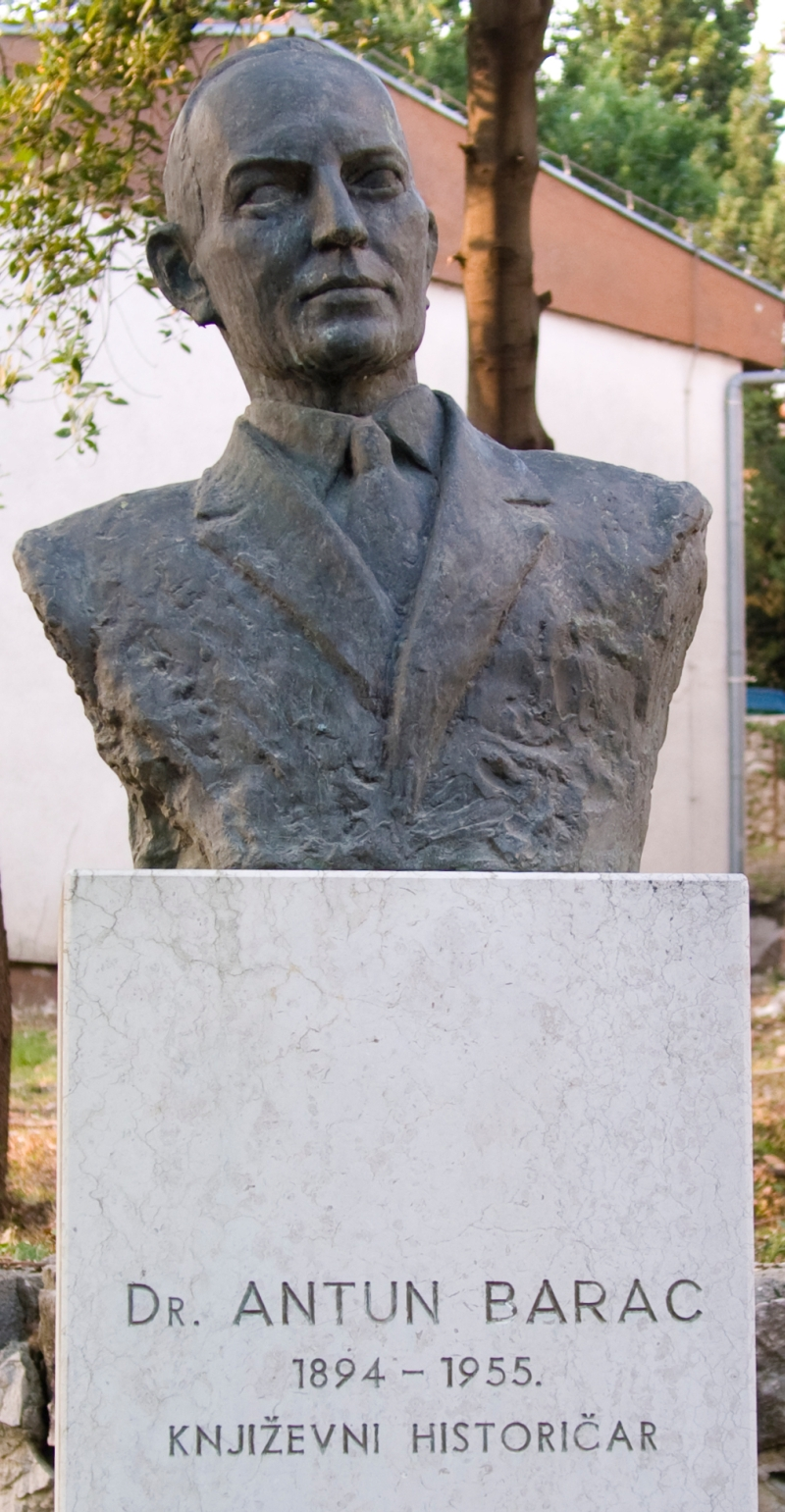 spomenik Antunu Barcu u Crikvenici